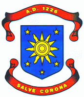 Escudo de Armas de Dingwall, localidad de Escocia.